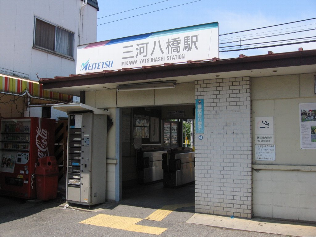 三河八橋駅駅舎